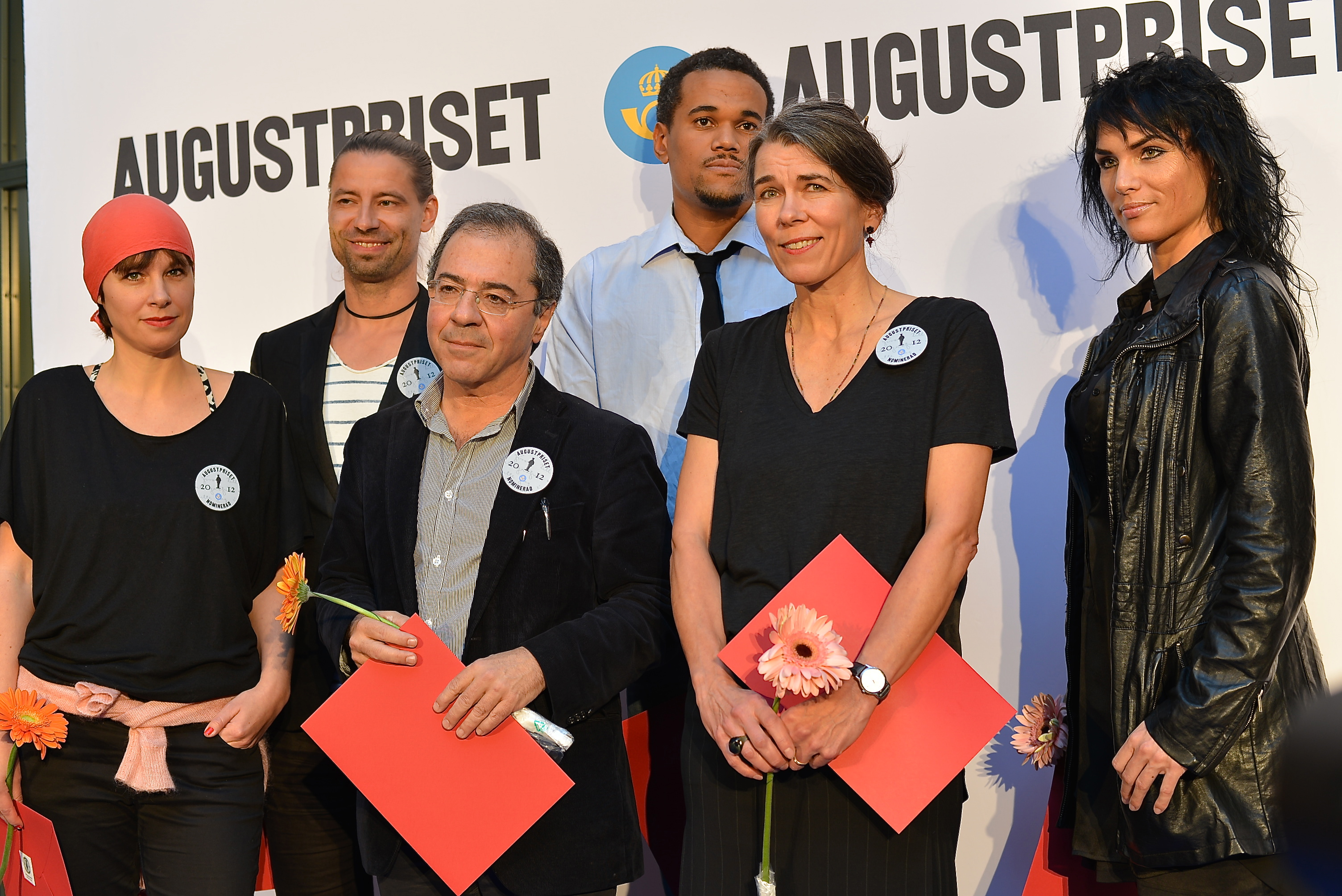 Augustprisnominerade i skönlitt. klassen 2012